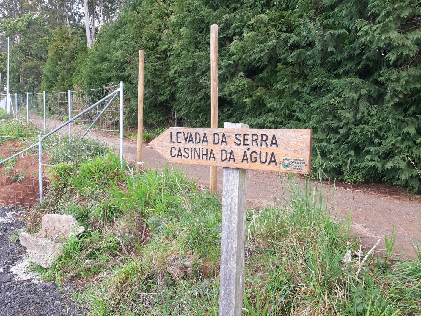 Placa de indicação da levada da serra e da casinha de água